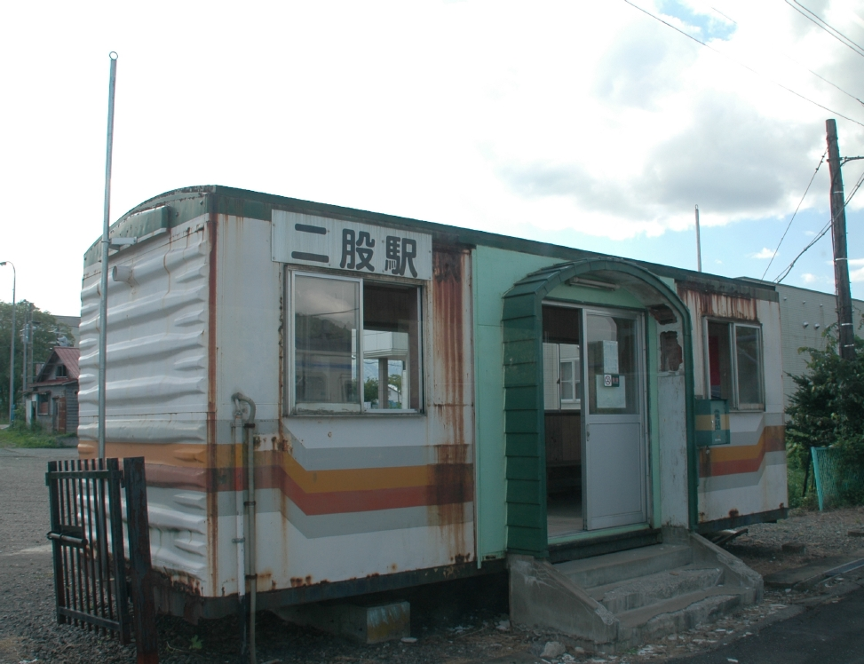 JR-Hokkaido(JAPAN) Hakodate Line, Futamata Sta. photo by (2005.8.28)